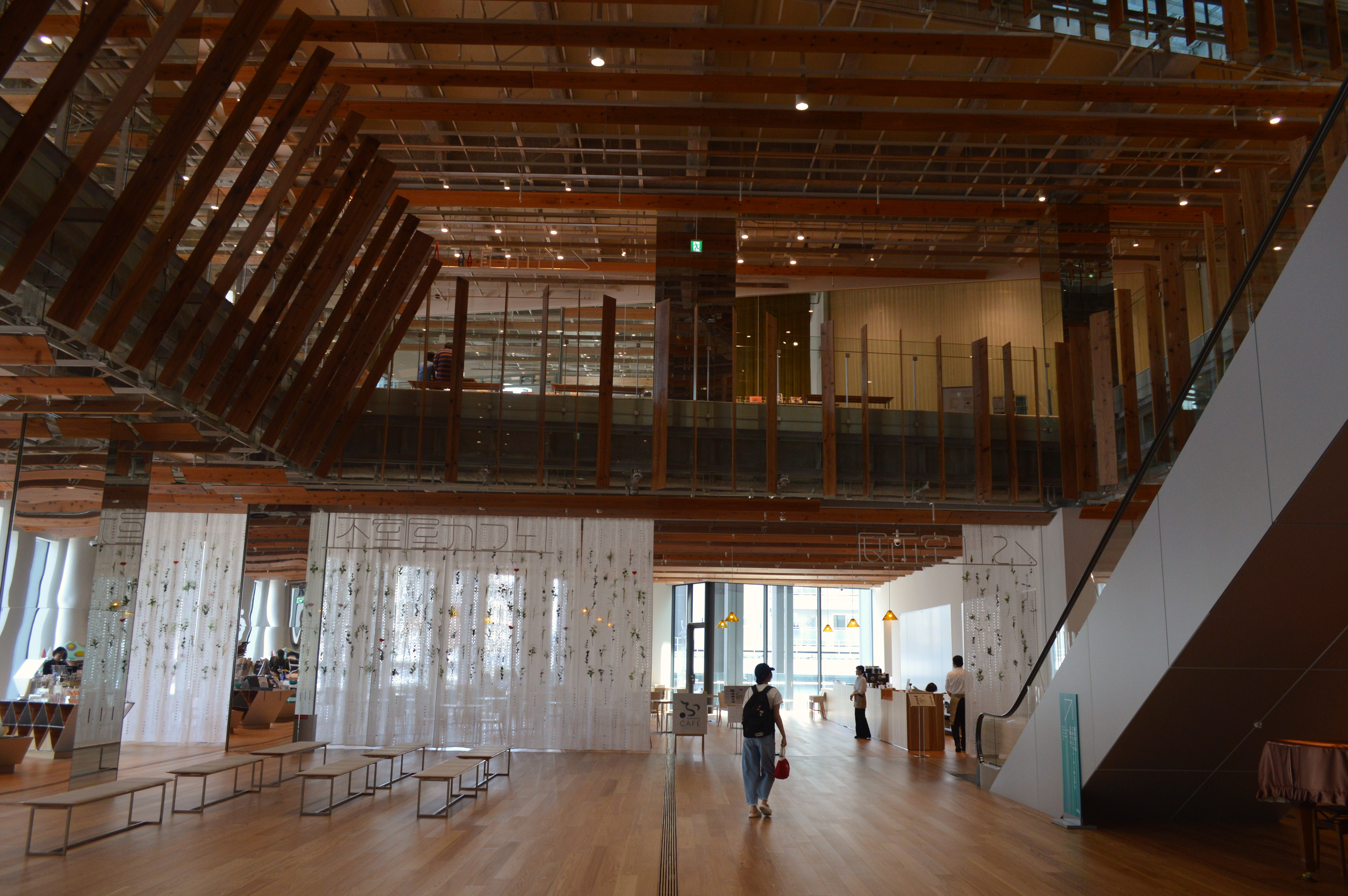 TOYAMAキラリ2階のカフェスペース。FUMUROYACAFE（金沢 加賀麩不室屋）が入っている。